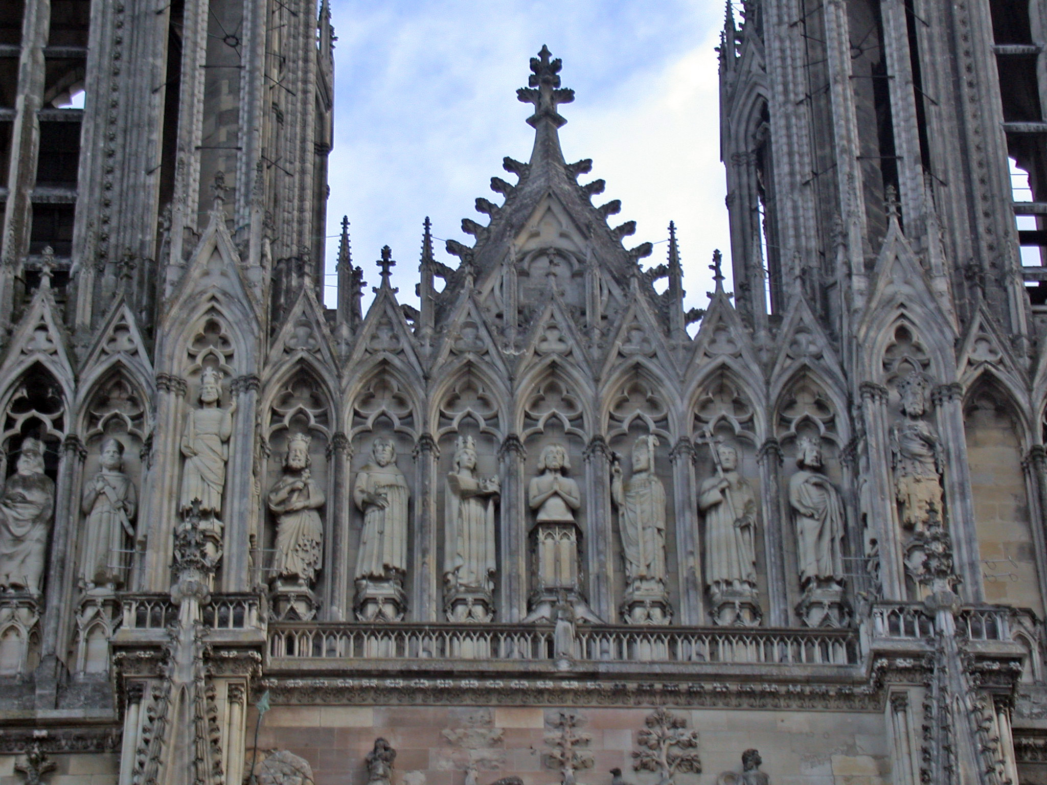 France, Reims, cattedrale di Notre Dame, esterno, facciata, galleria dei re